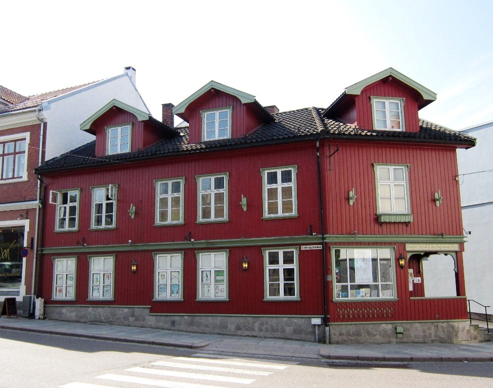 Avistegnernes hus i Drøbak